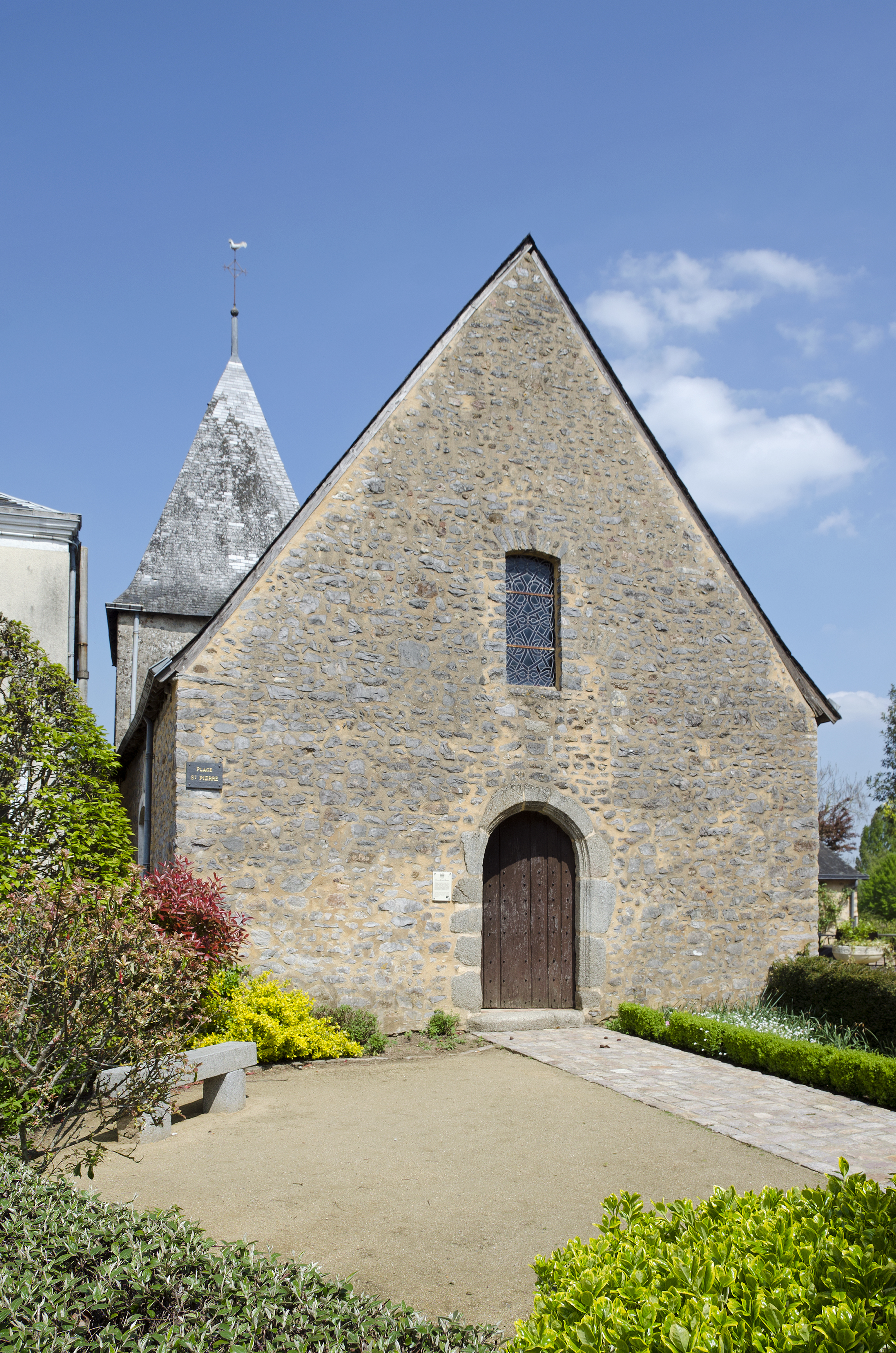 Église Saint-Pierre de Saulges, Mayenne.